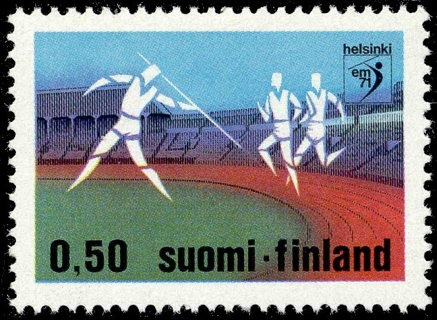 Yleisurheilun EM-kisat 1971 Helsingissä